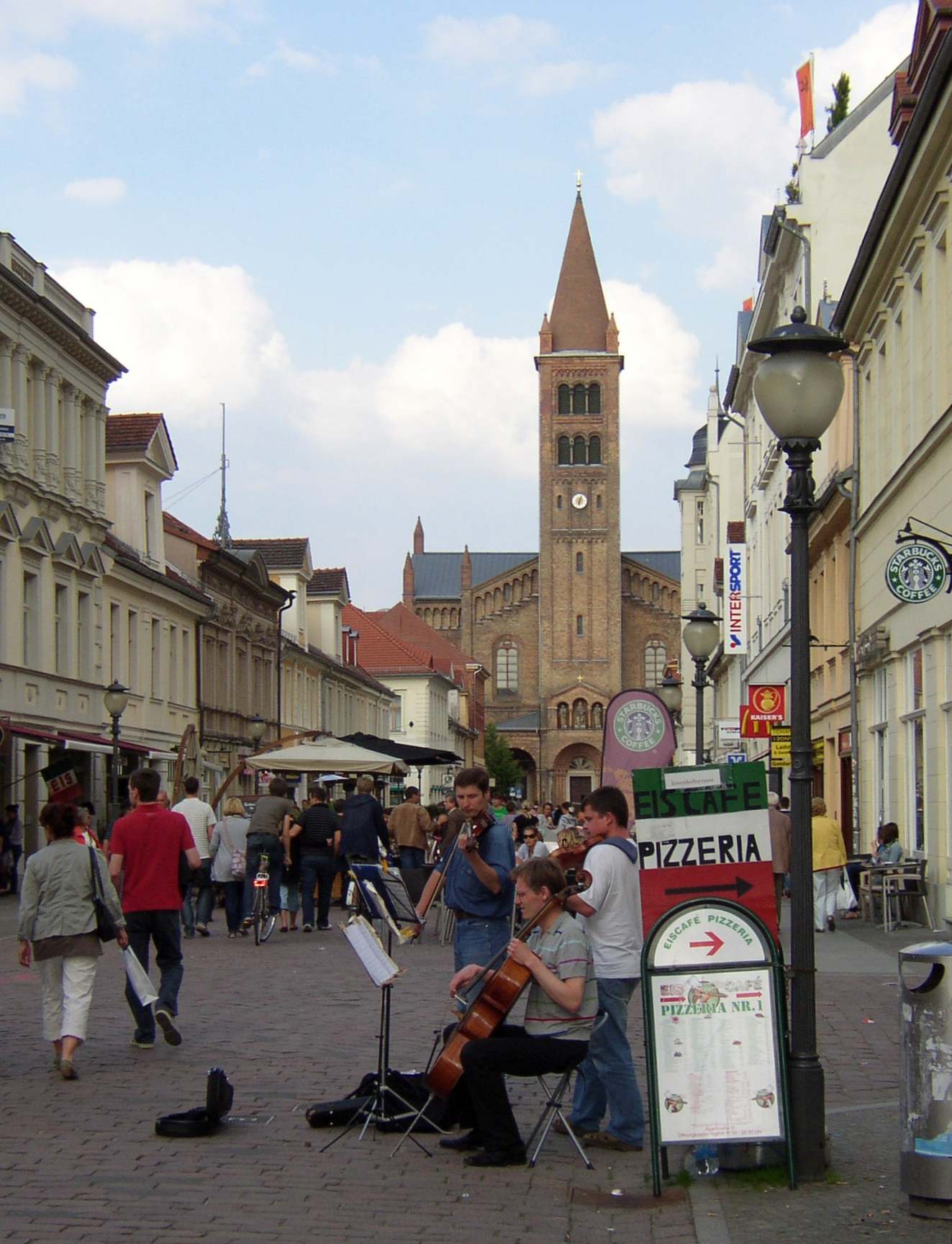 Potsdam, Fußgängerzone Brandenburger Straße mit Blick auf Peter&Paul